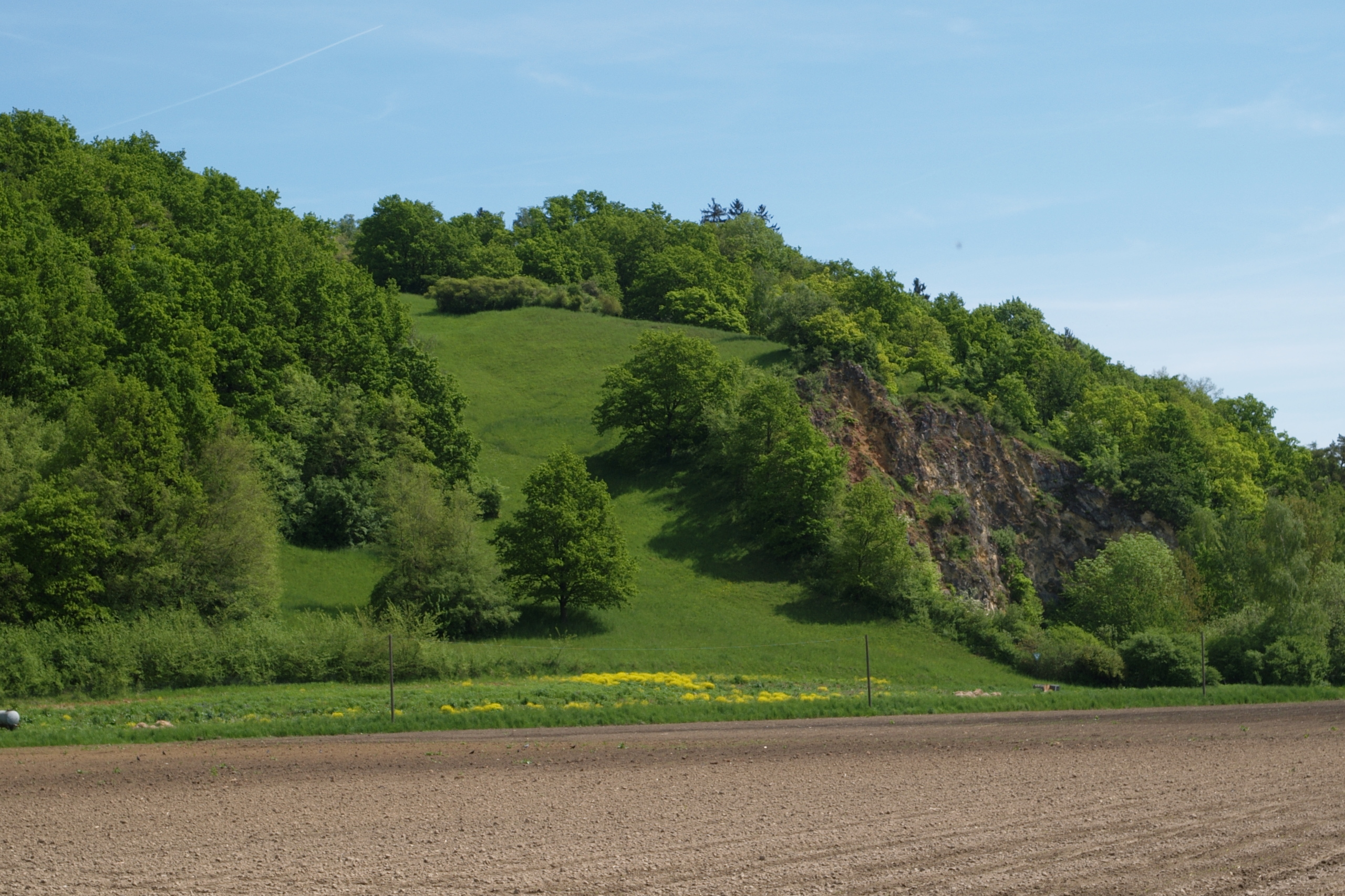 Helmberg bei Münster